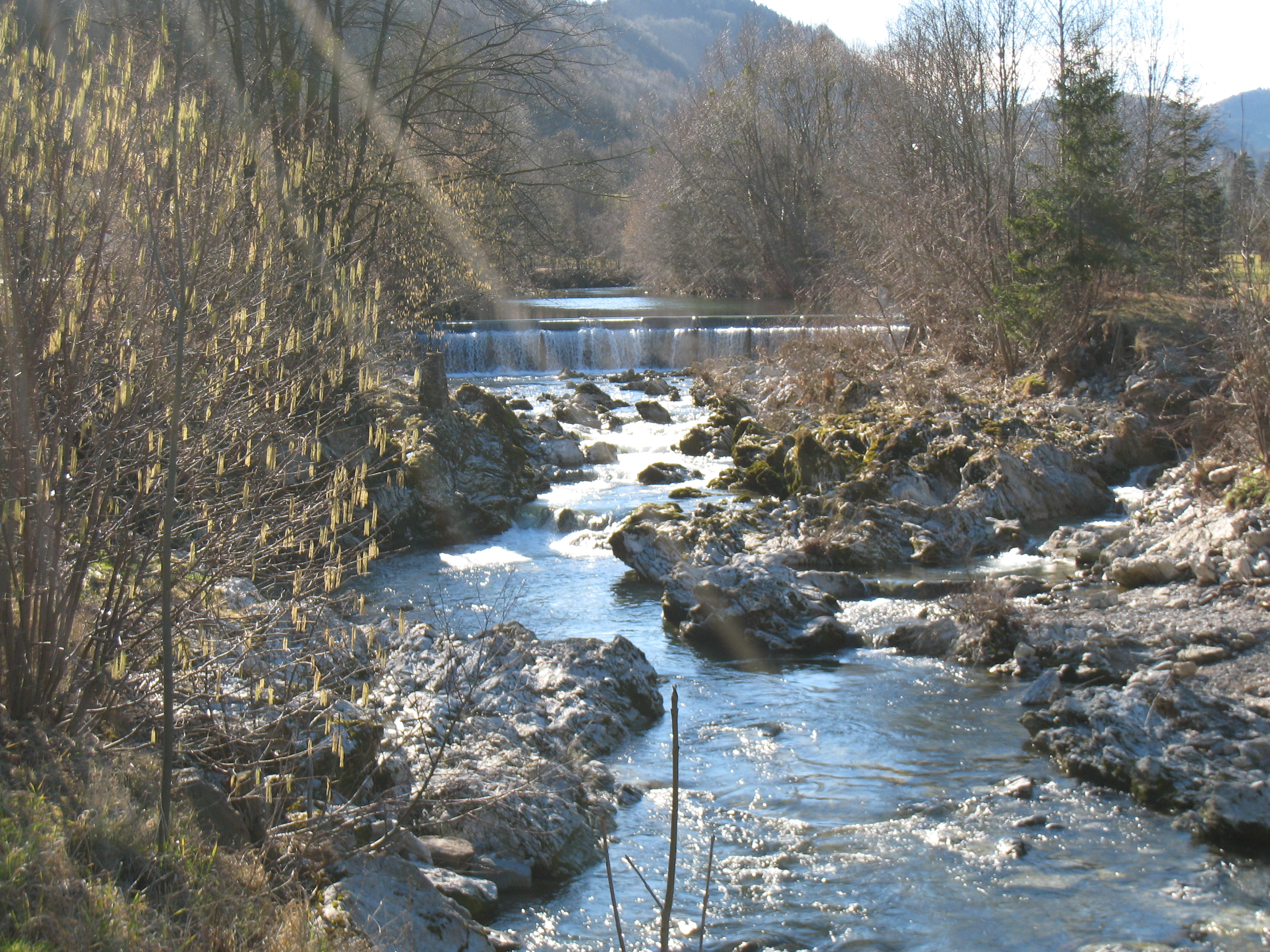 Pielachwehr zwischen Kirchberg und Dobersnigg (Gemeinde Loich)